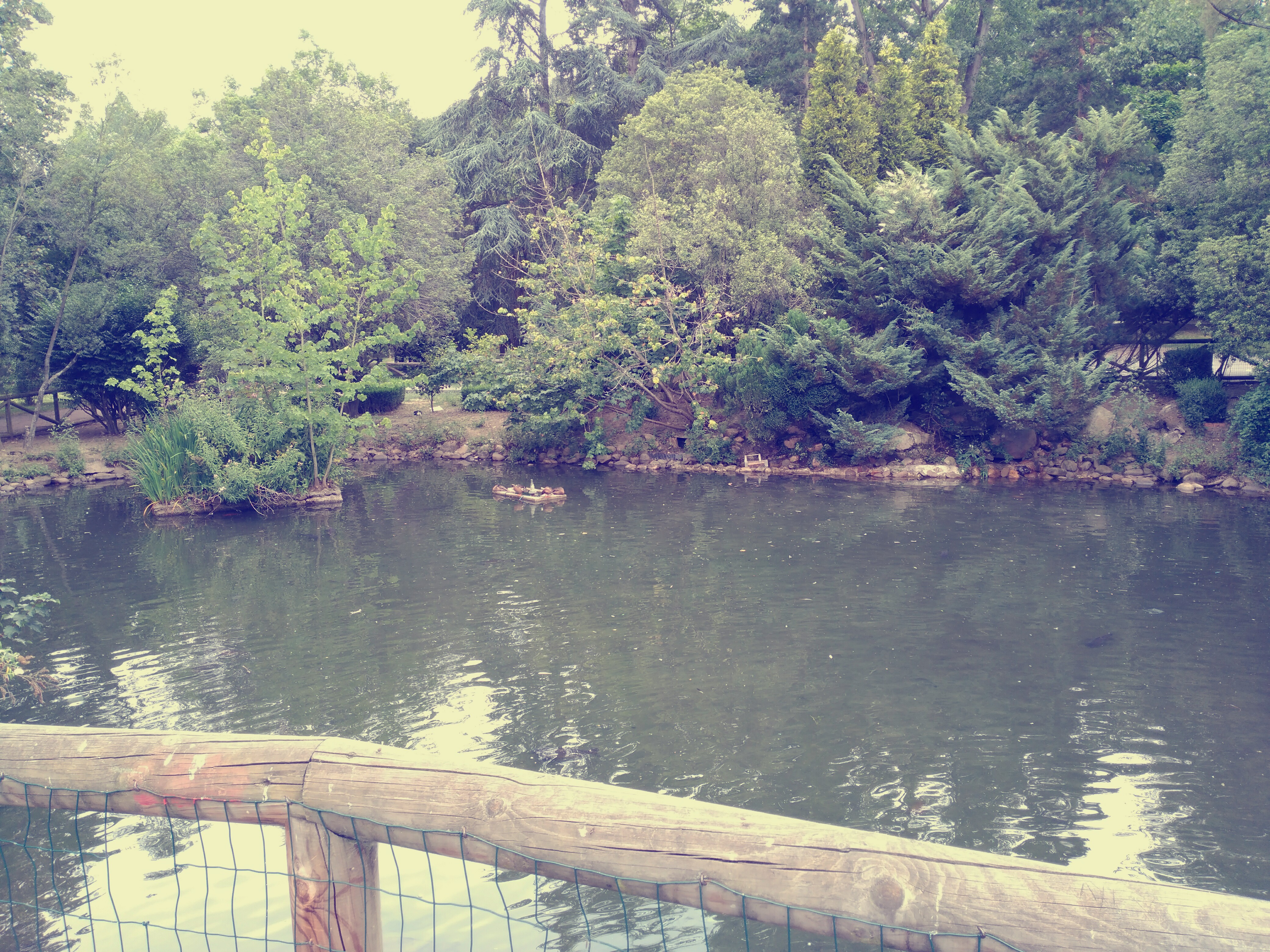 Estanque Parque Garcia Lago La Felguera (Langreo, Asturias)